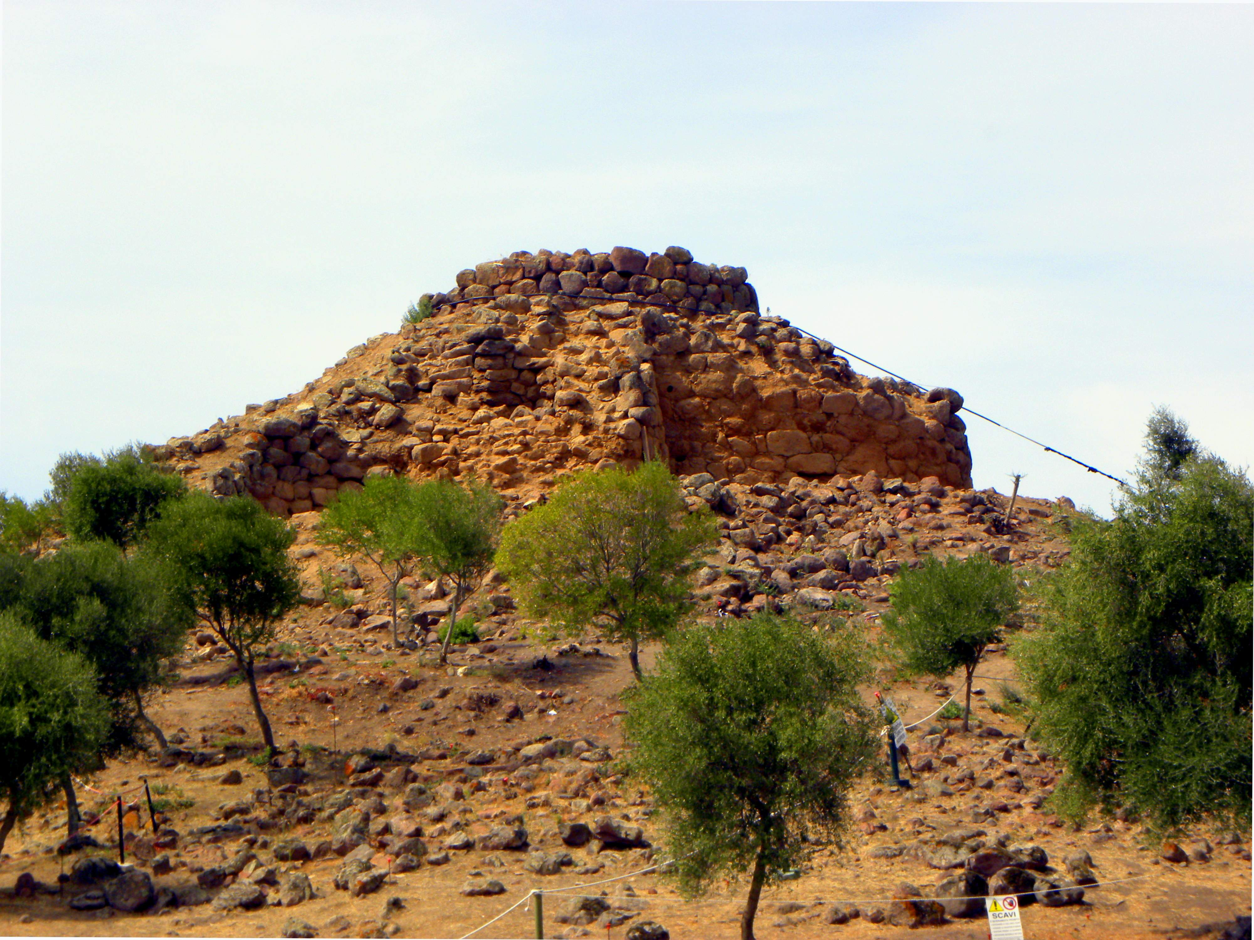 Foto del Nuraghe Sirai - Carbonia - Sardegna